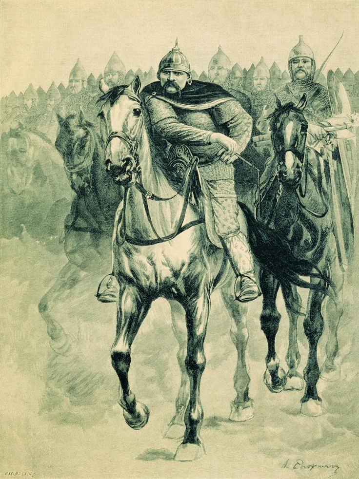 Волга Всеславьевич. 1895. Иллюстрация к книге "Русские былинные богатыри"